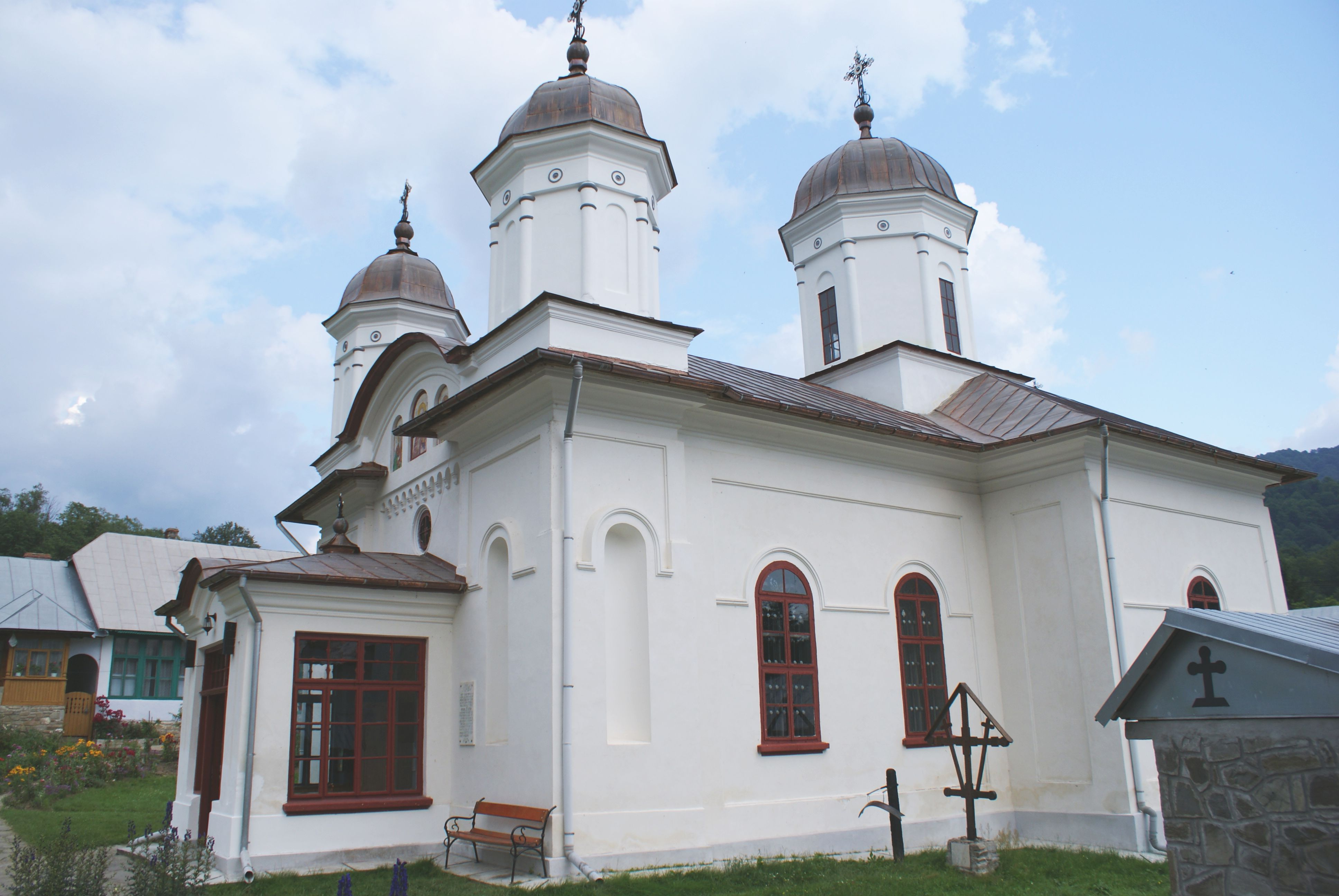 Biserica "Sf. Nicolae" 01